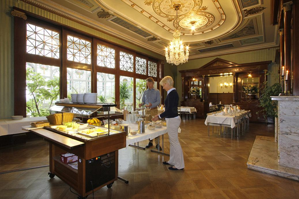 Speisesaal auf Schloss Craheim. Nutzung durch Seminargäste.